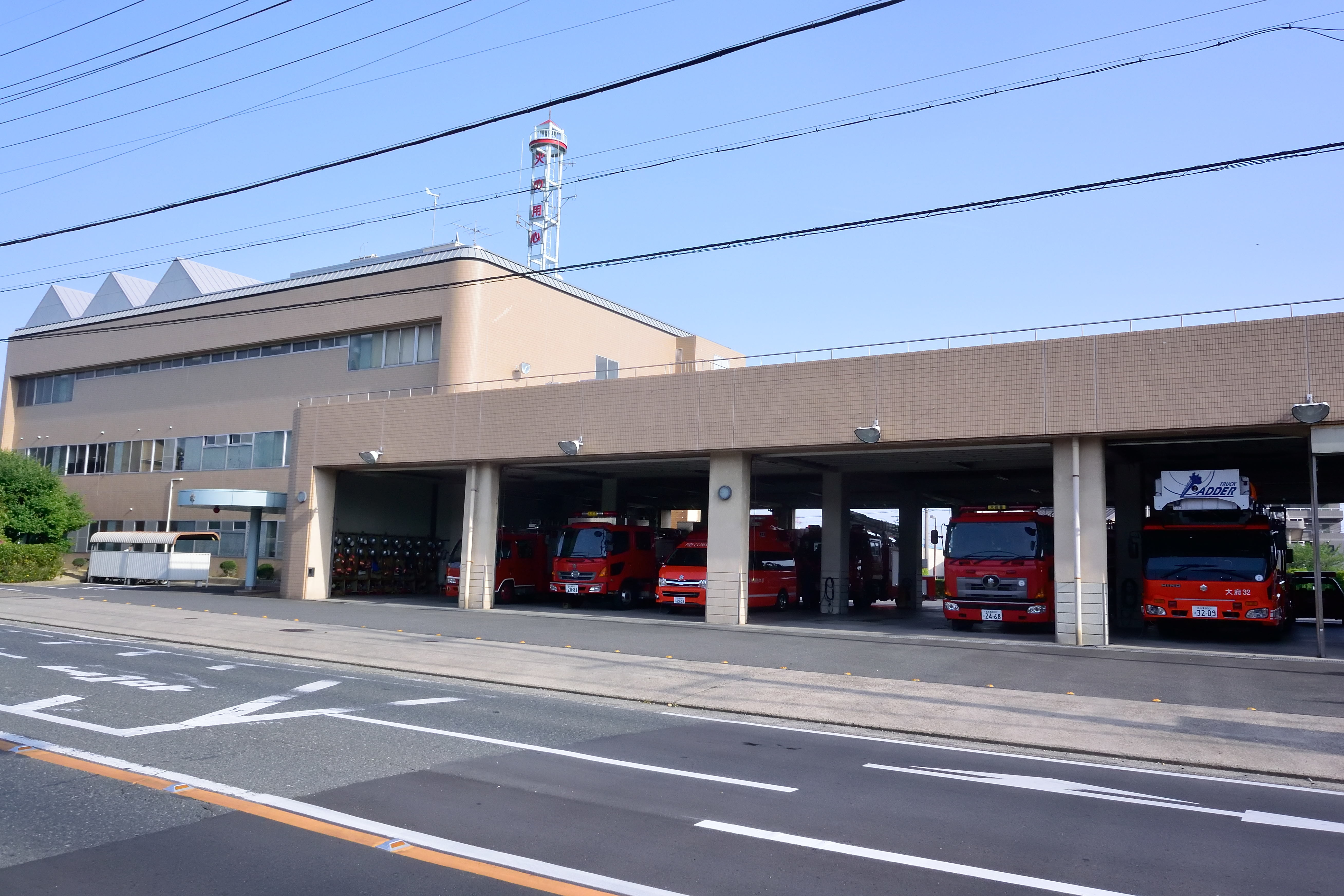 大府市消防本部